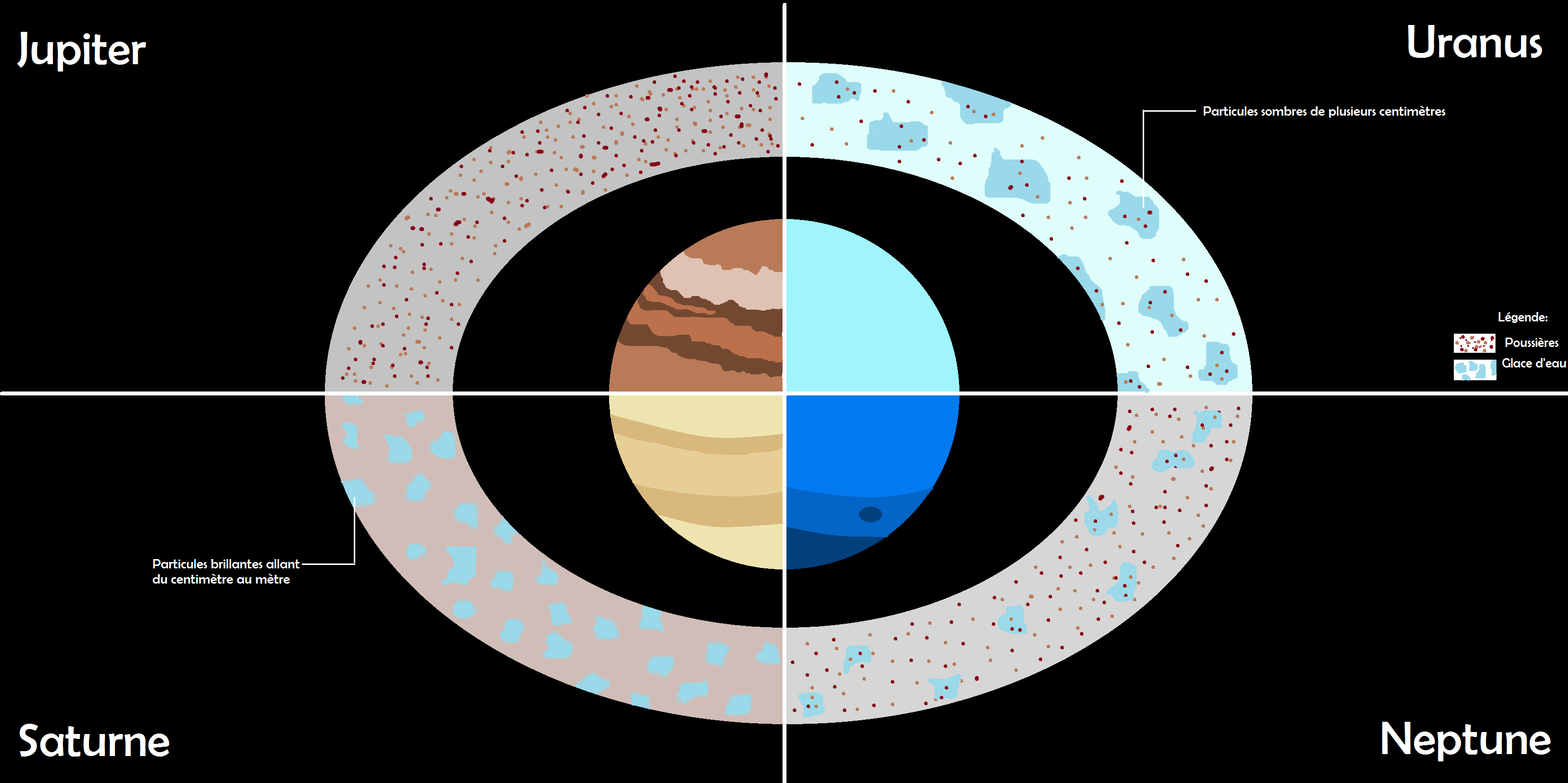 Schéma des anneaux planétaires des quatre géantes gazeuses du système solaire. Sources : Composition des anneaux : - - - Jupiter